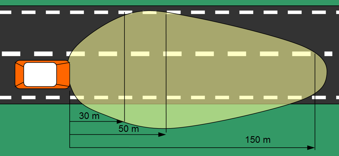 eclariage en feux de route